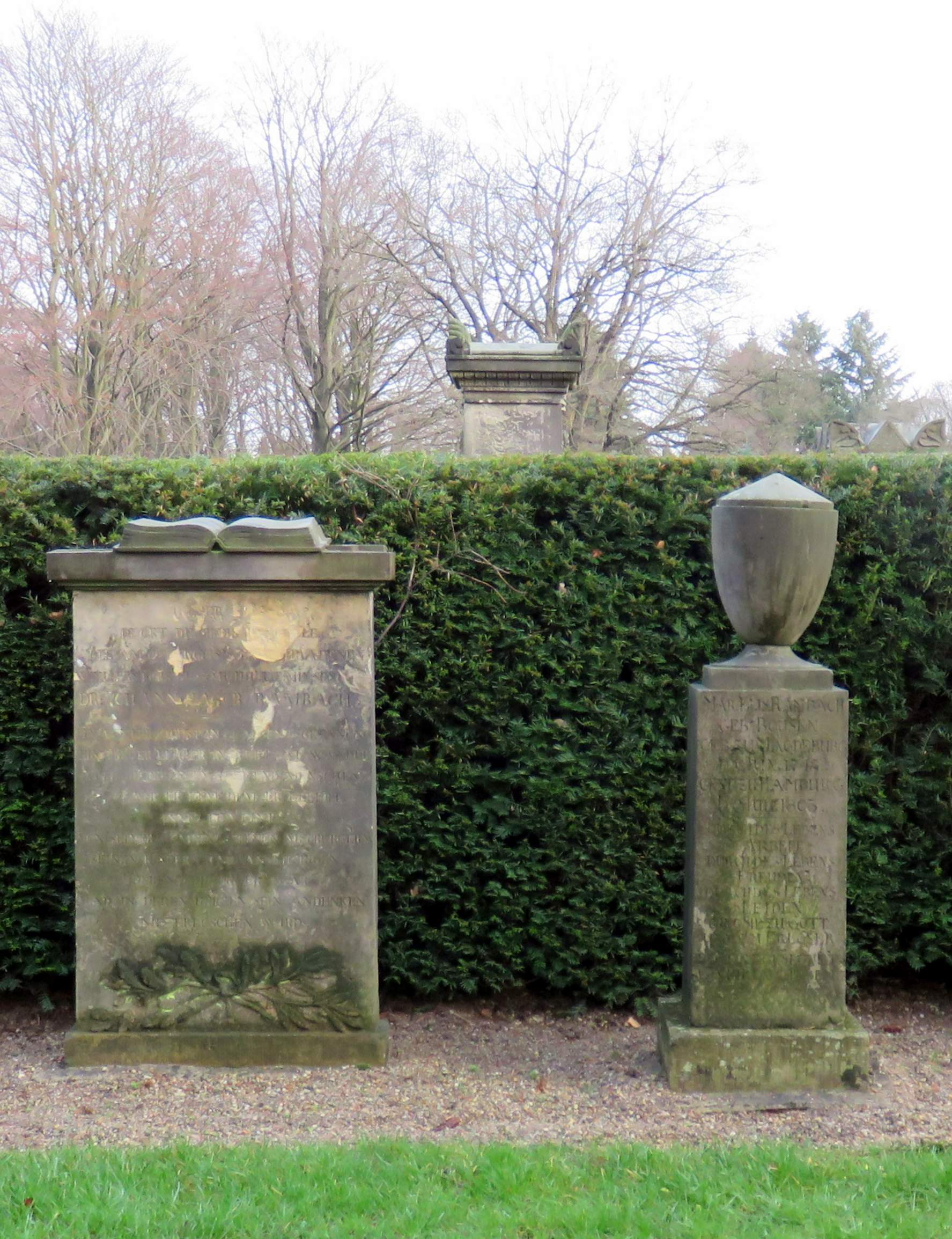 Links: Grabmal für Pastor Johann Jacob Rambach (1737-1818) im Grabmal-Freilichtmuseum Heckengarten auf dem Hamburger Friedhof Ohlsdorf. Inschrift bei . Rechts daneben Grabmal für seine zweite Ehefrau Margarethe Elisabeth, geborene Boysen (deren Inschrift bei .)